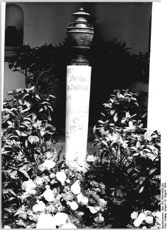 Gotha, Columbarium, Urne ADN-ZB Ludwig-9.8.84 Bezirk Erfurt: Die Urne Bertha von Suttners im Columbarium des Gothaer Hauptfriedhofs.